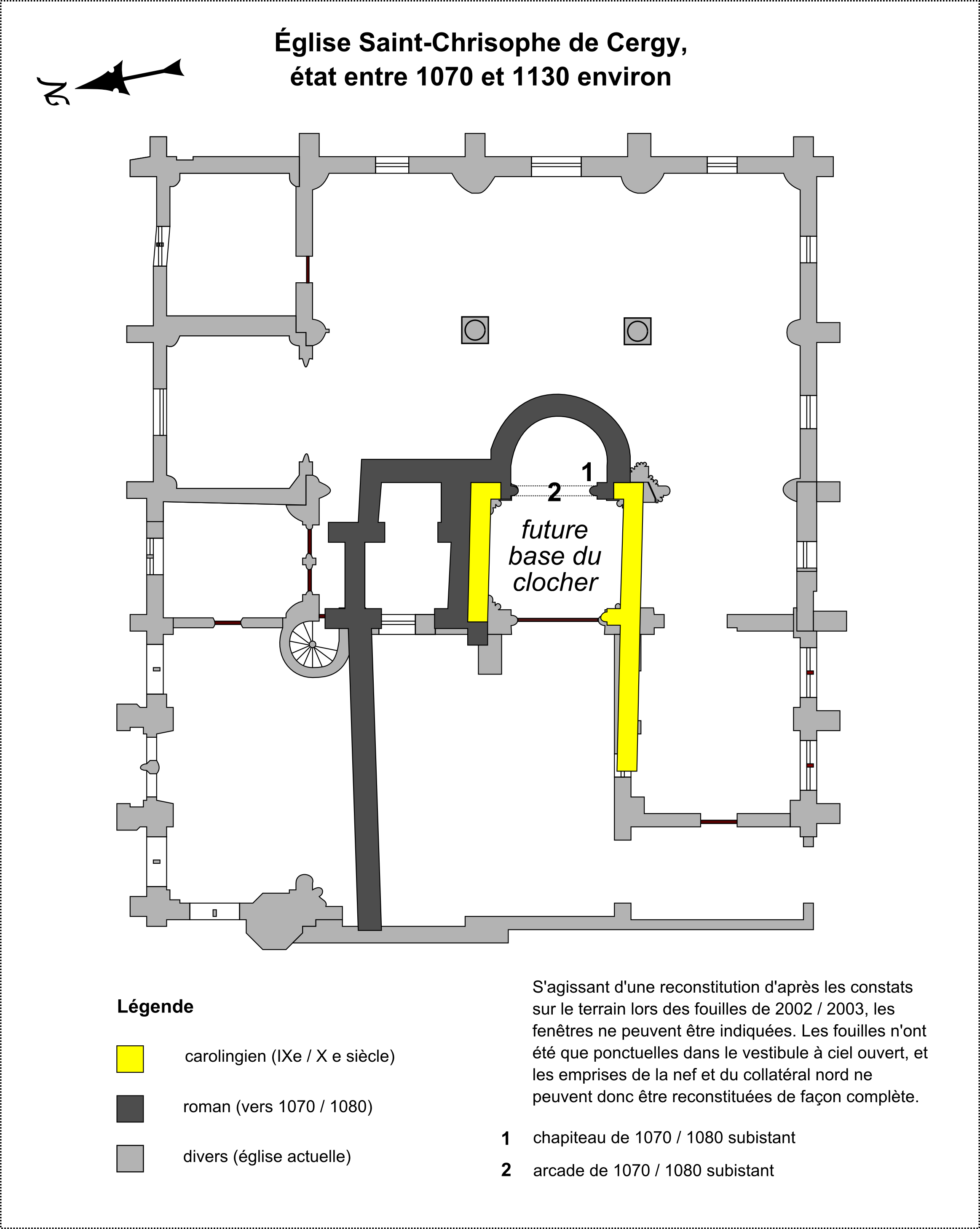 Plan de la première église romane de la seconde moitié du XIe siècle (vers 1070 / 1080) et des parties subsistant à cette époque de la chapelle carolingienne.